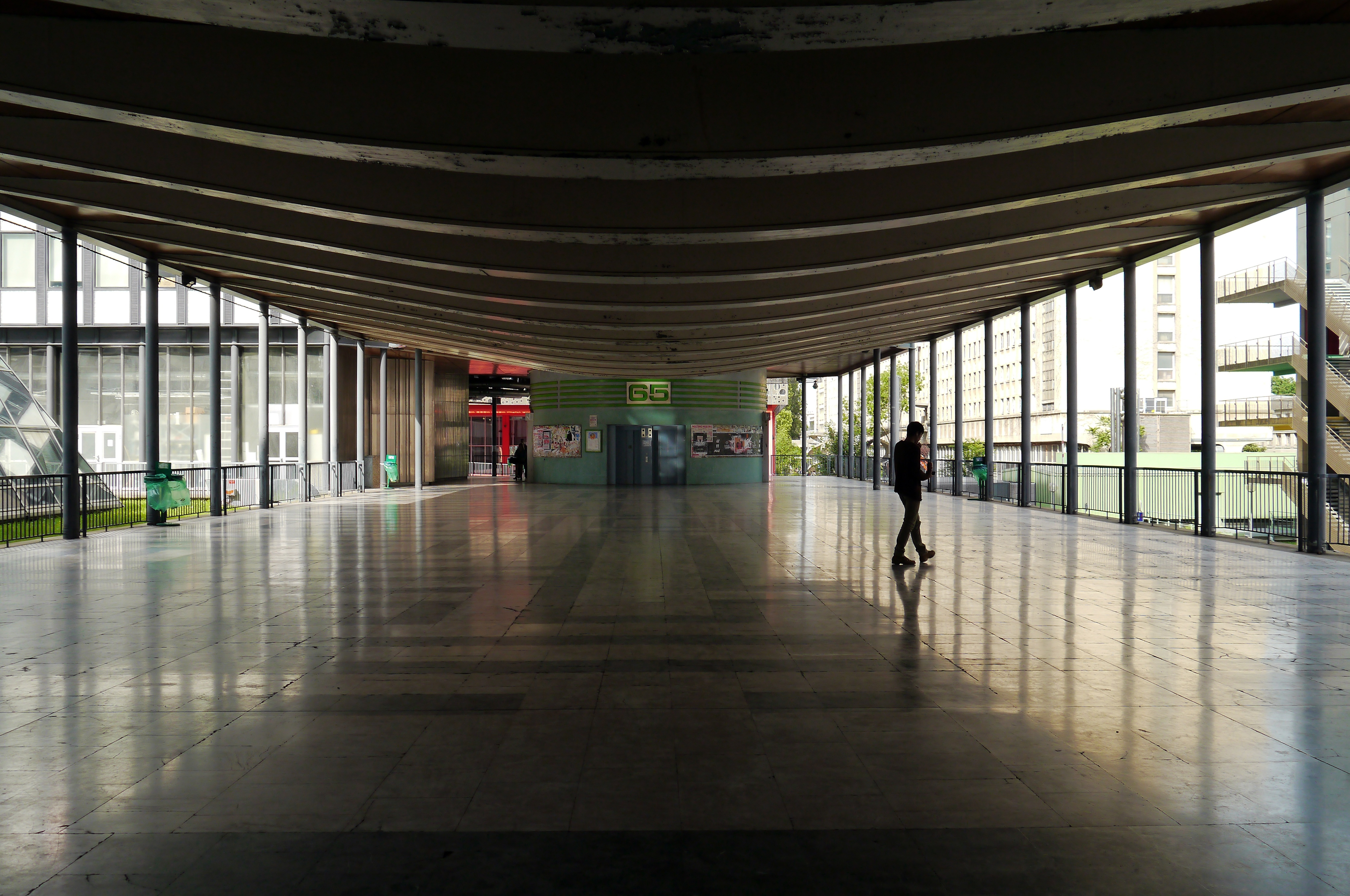 Campus universitaire de Jussieu